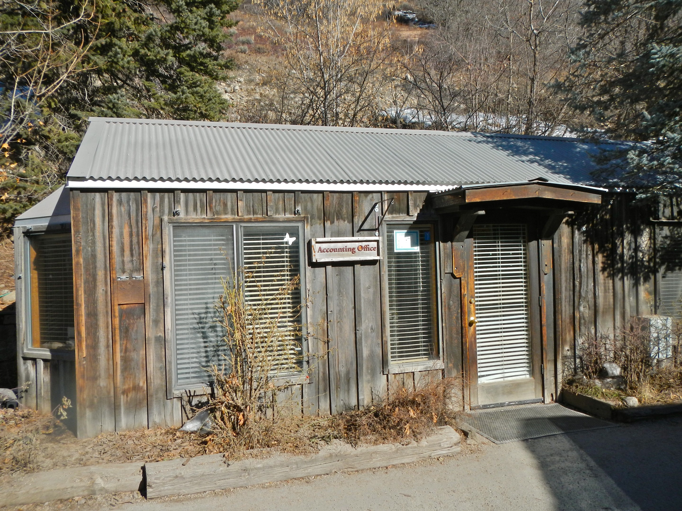 Sundance Resort